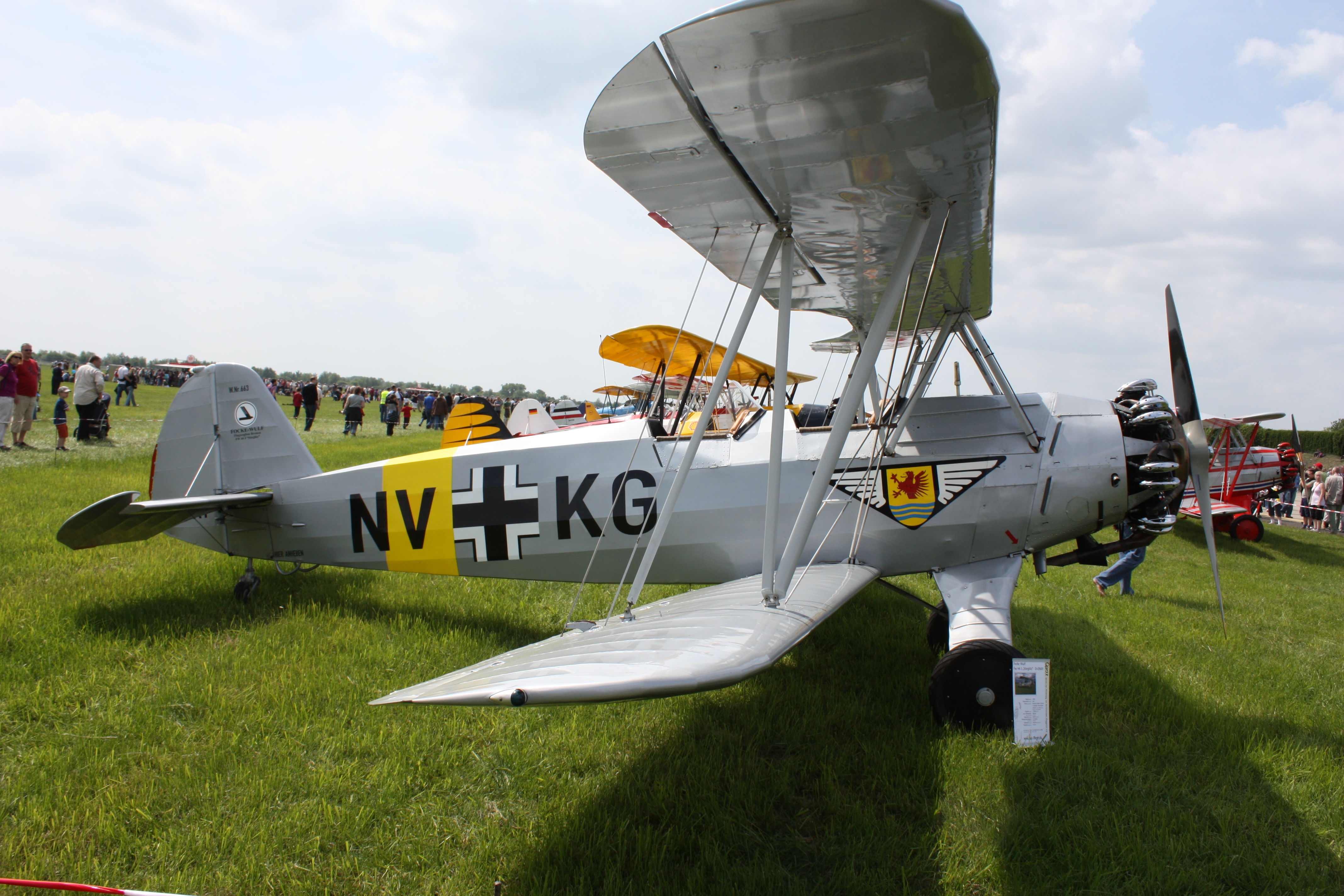 Bremen Airport Flugtag 2009; Focke-Wulf Fw 44J Stieglitz; D-ENAY (NV-KG)